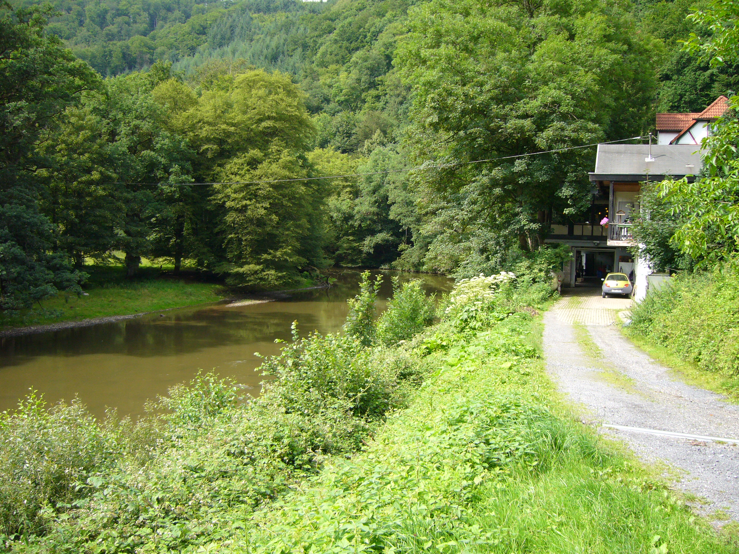 Wied